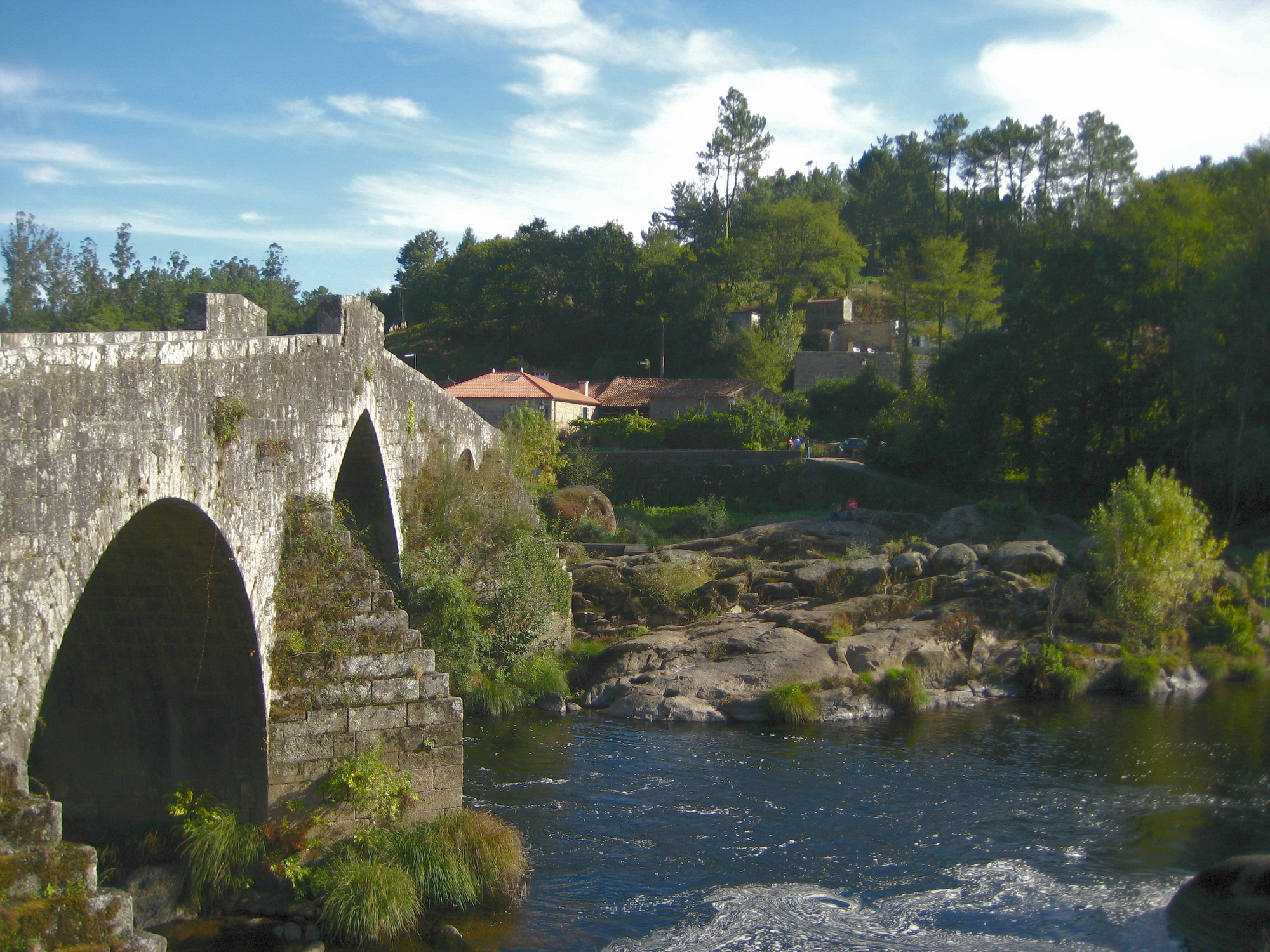 Río Tambre en Ponte Maceira. Ponte Maceira vese dividida polo Tambre. A parte esquerda de Ponte Maceira pertence a Portor, concello de Negreira; a parte dereita, a Ponte Maceira, concello de Ames. Galiza